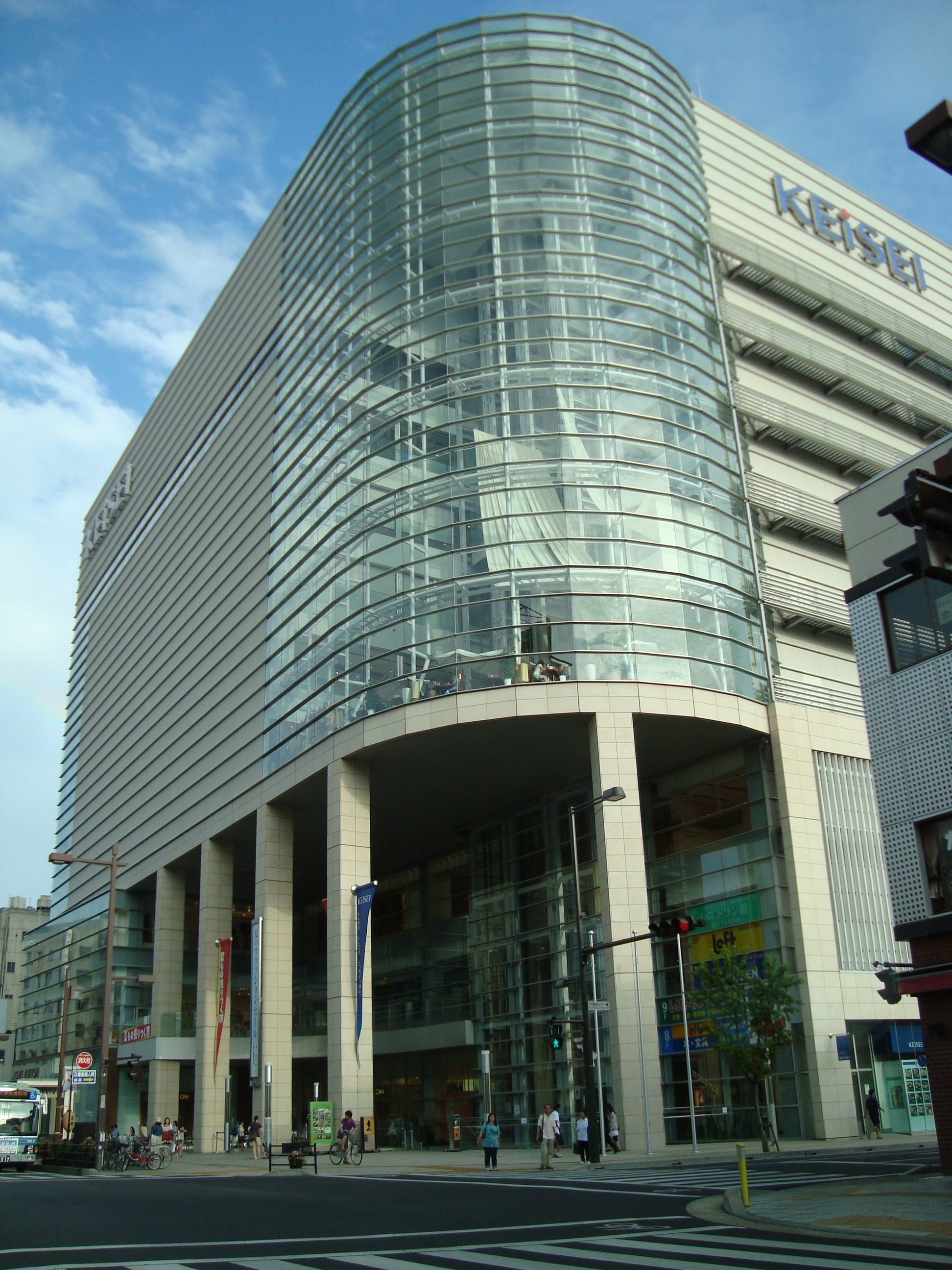 京成百貨店 店舗外観 茨城県水戸市